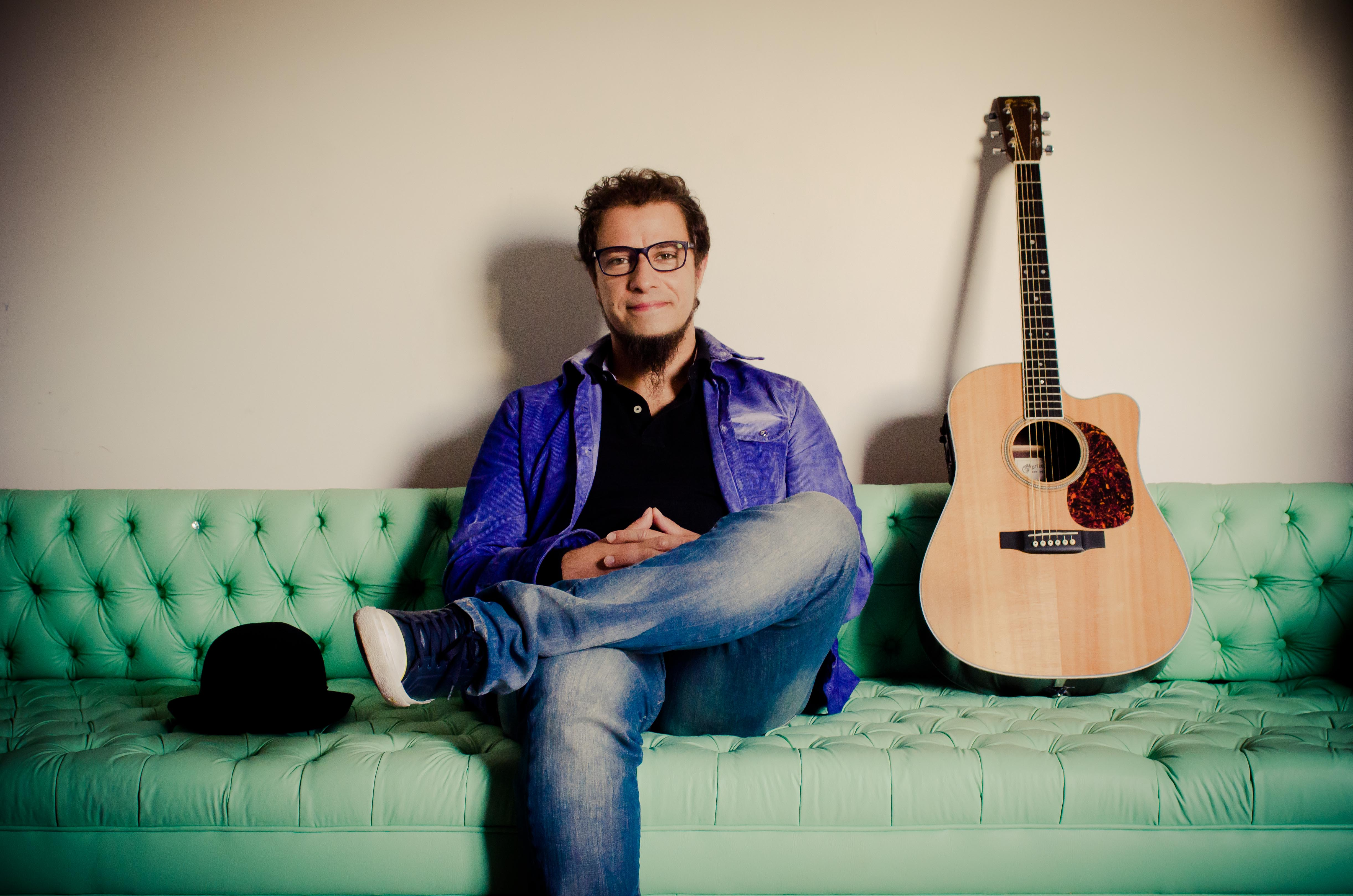 Foto de divulgação